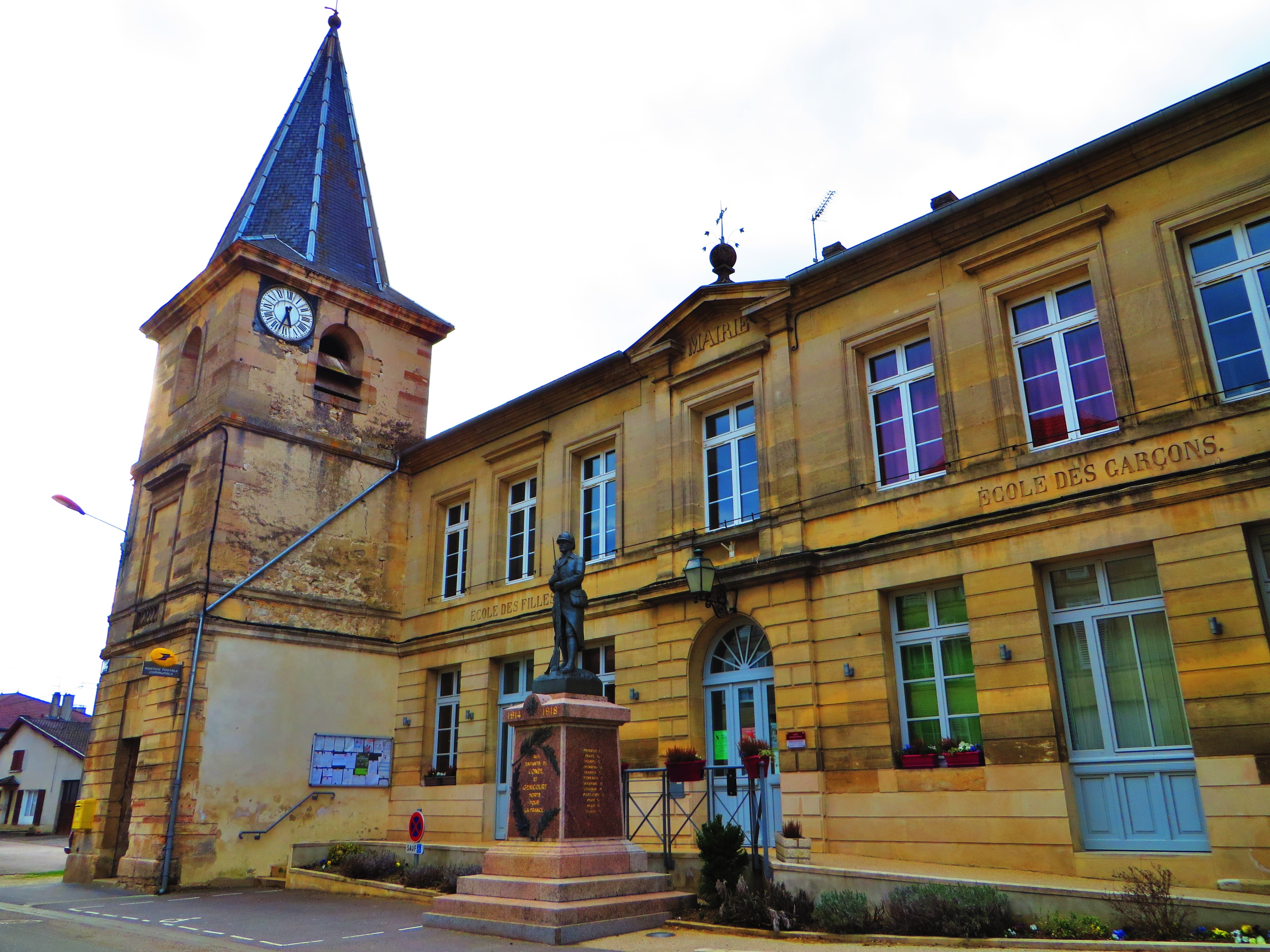 Hauts Chee Conde mairie